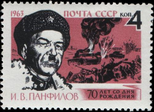 Почтовая марка СССР - Панфилов Иван Васильевич, Герой Советского Союза